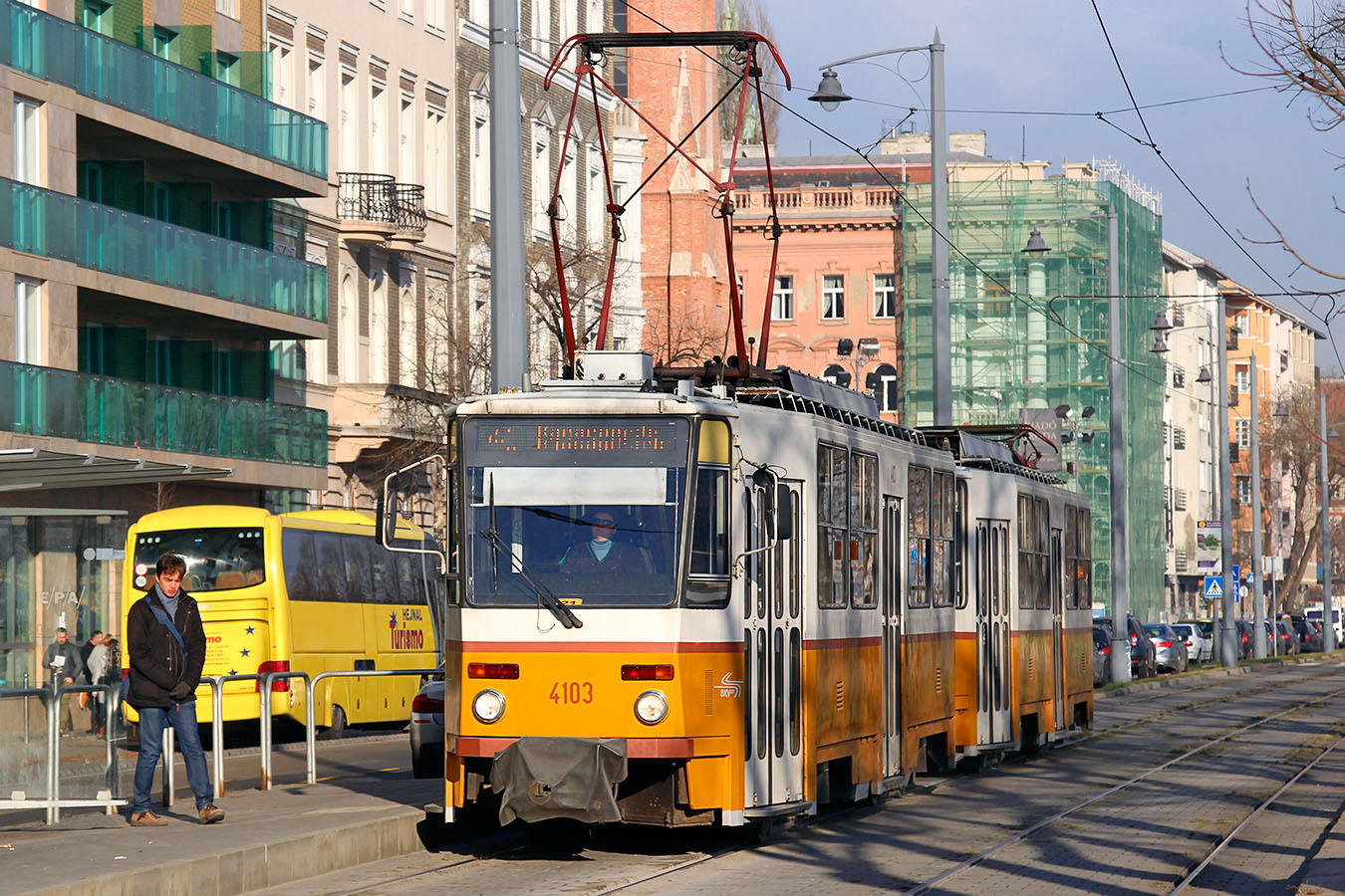 Tatra T5C5 típusú villamos a Halász utca megállóhelynél